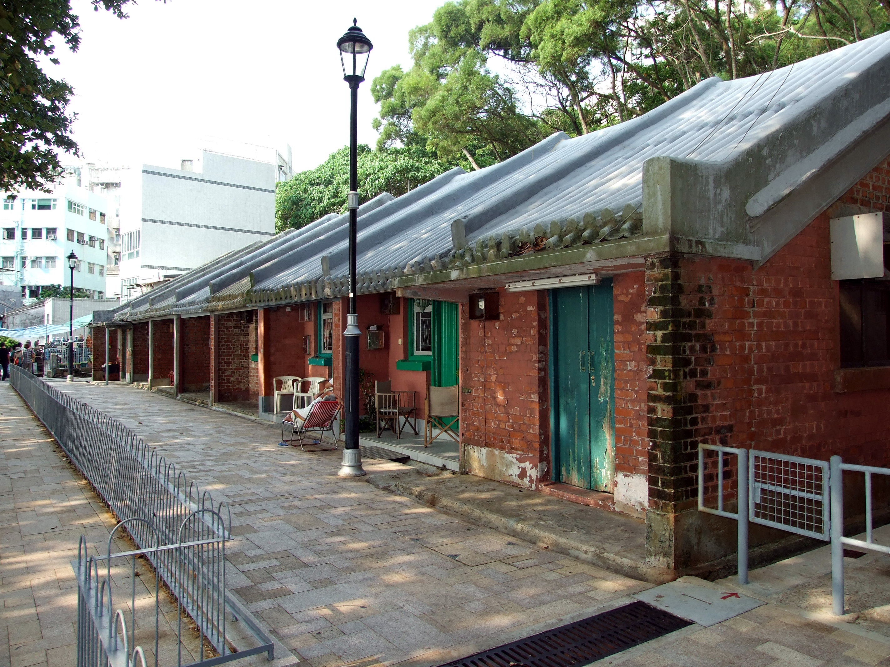 中文（香港）: 赤柱「八間屋」